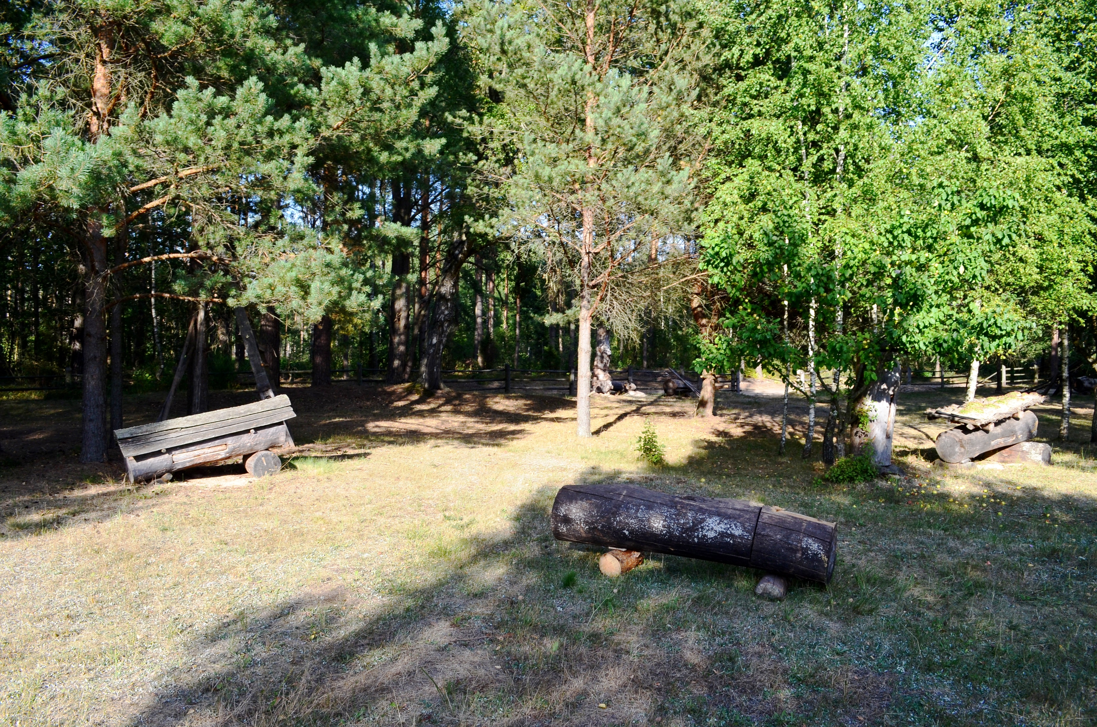 Musteikos bitininkystės muziejaus aviliai, Varėnos r.